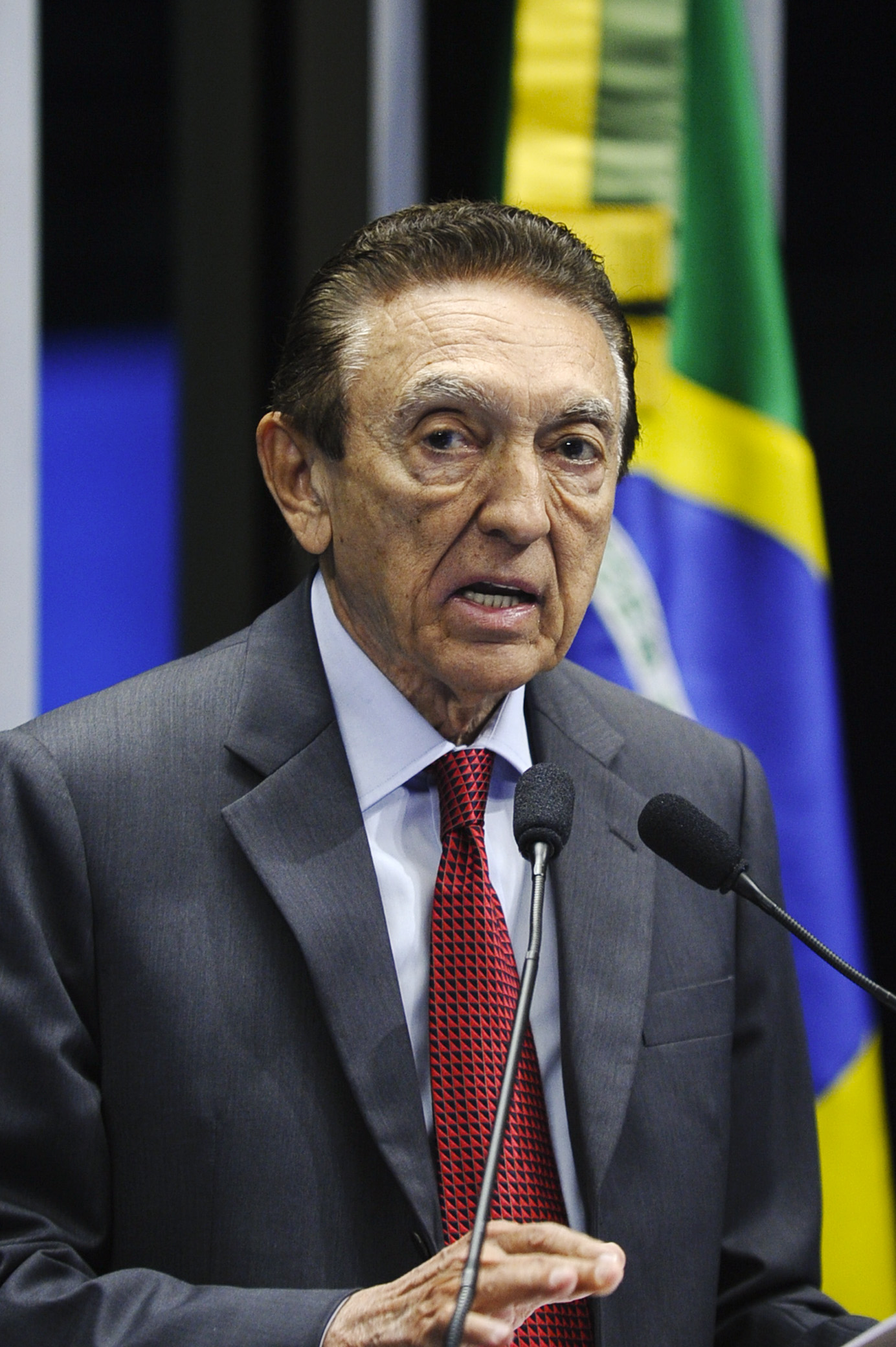 Plenário do Senado durante sessão não deliberativa. Em discurso, senador Edison Lobão (PMDB-MA). Foto: Marcos Oliveira/Agência Senado.